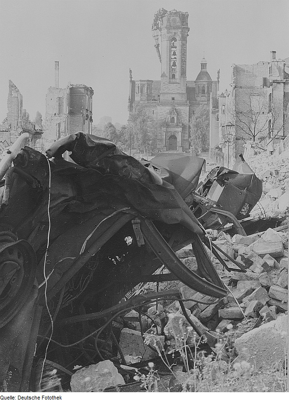 Original image description from the Deutsche Fotothek Dresden. Trümmerfeld gegen die zerstörte Lukaskirche